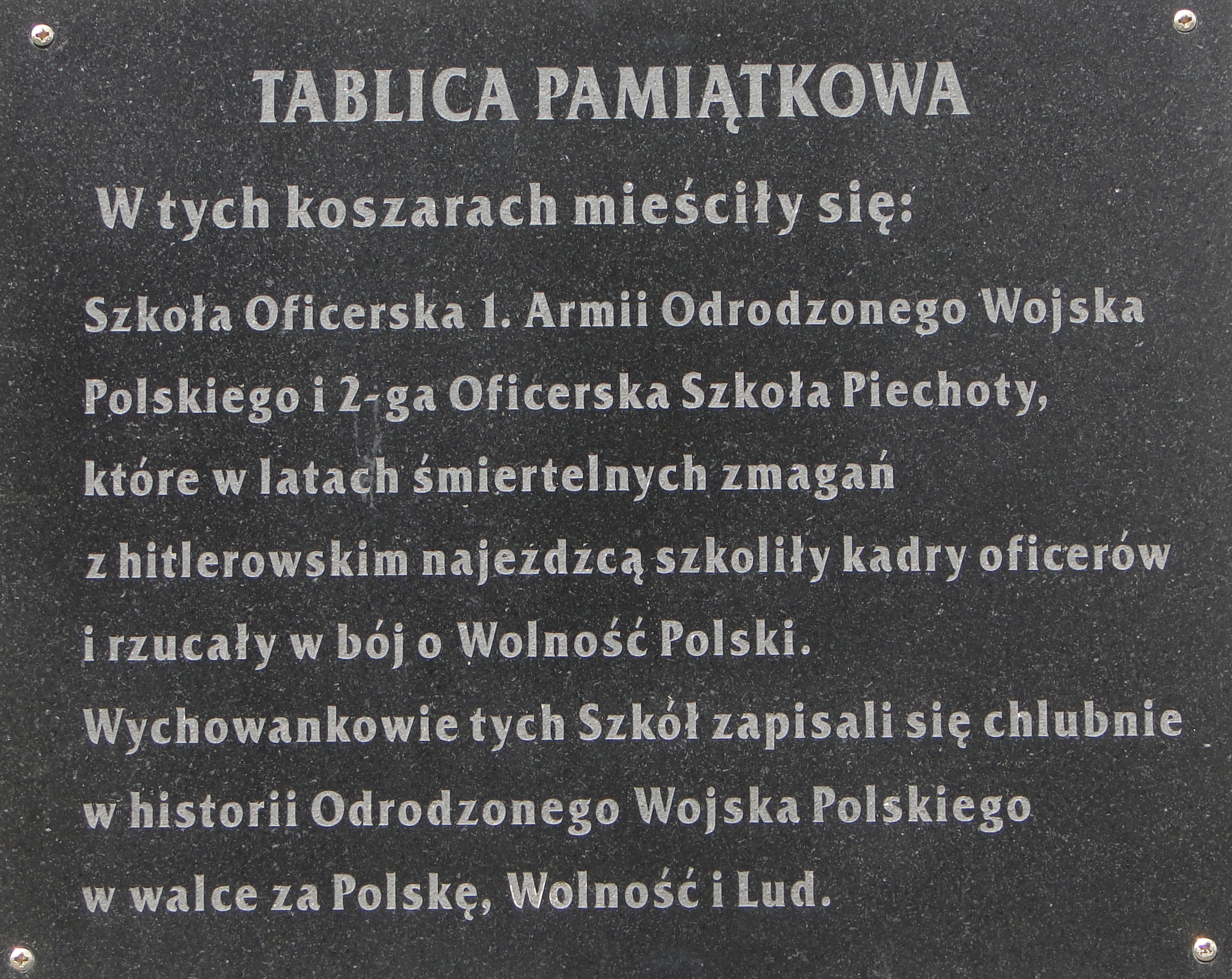 Tablica na budynku sztabu dawnych koszar w Gryficach